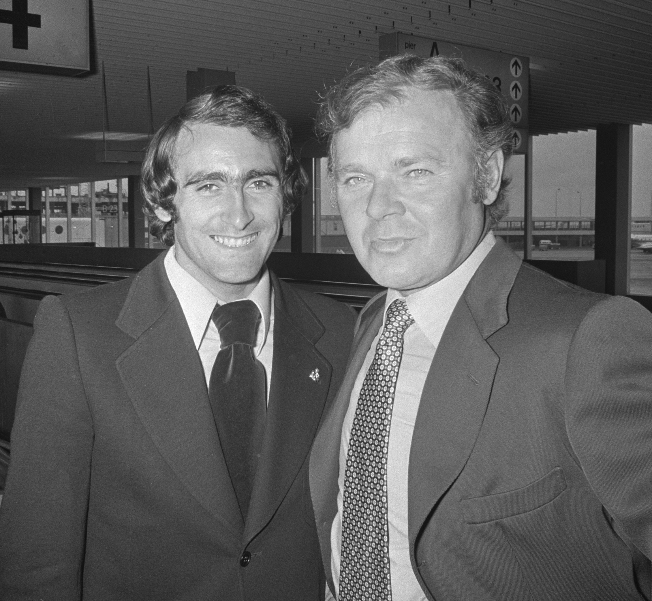 Pirri en Kubala op Schiphol